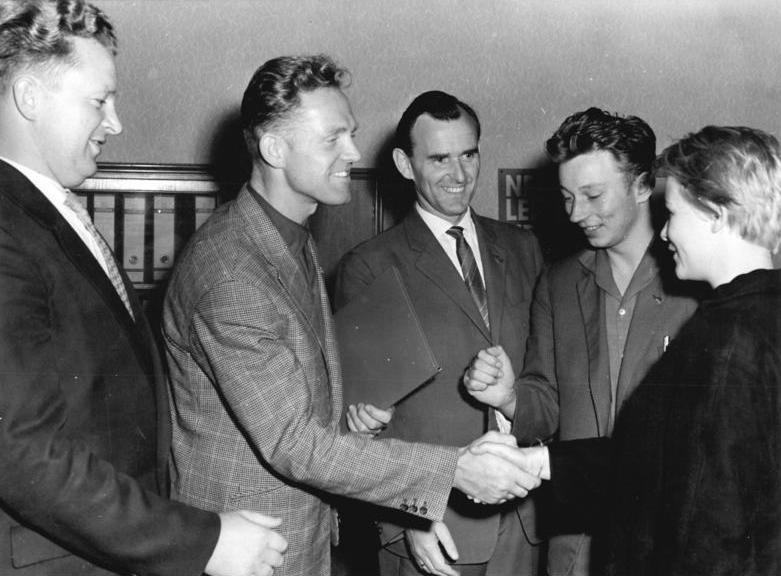 Zentralbild/Krueger 11.8.1961 Die Republik verlangt Schutzmaßnahmen gegen Menschenhandel Seit den frühen Vormittagsstunden des 11.8.1961 treffen im Gebäude der Obersten Volksvertretung der DDR in der Berliner Luisenstraße unablässig Gruppen von Arbeitern, von Bäuerinnen, Angestellten und Angehörigen des Mittelstandes aus allen Teilen der DDR ein, um noch vor Beginn des Zusammentritts der von ihnen gewählten Abgeordneten Einfluß zu nehmen auf die Tagesordnung dieser bedeutsamen Sitzung. Die Forderungen dieser Delegationen, denen Abgeordnete aller Fraktionen des Hauses Dank und Anerkennung für ihr Erscheinen zollen, lauten einhellig: erhöhter Schutz der Republik und ihrer Hauptstadt gegen die Bonner Menschenhändler, gegen Agentenunwesen und Kopfjäger. UBz: Die Lehrlinge des VEB Berlin-Chemie begrüßen den Abgeordneten Gustav-Adolf Schur den zweimaligen Straßenweltmeister, und überreichen ihm eine Resolution.